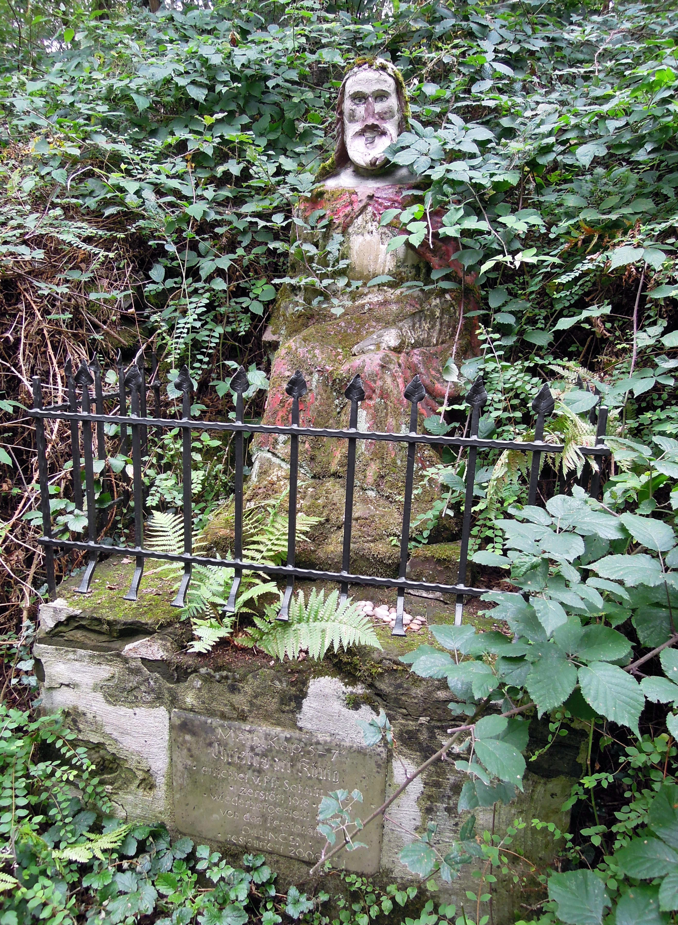 Von Pfarrer Philipp Schmitt geschaffene Statue am Kreuzweg am Heiligenberg (vormals Galgenberg) im Hüttenwald. Sie zeigt Jesus bei der Bergpredigt. Eine Tafel trug früher die Inschrift: "Ev. Math. 5, Vers 1-12." Heute: "Math. Kapitel 5-7" Dieser vermeintliche Matthäus hieß im Volksmund Matthias. 1918 wurde der Kopf zertrümmert. 1944 musste der Kopf der Statue ergänzt werden. Alois Lehnert kommentiert dies mit "Man sieht es ihm an". Weitere Restaurationen erfolgten unter anderem 1963 und 2000.